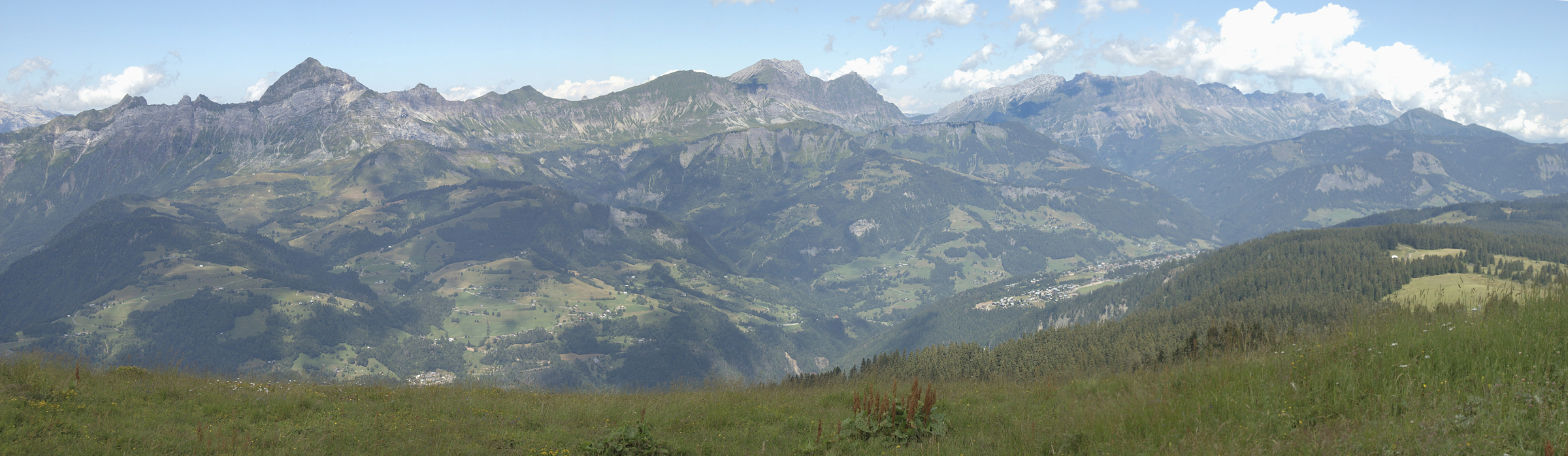 Montage des 3 photos de ²°¹°°: Image:Panoramique Aravis Sud.jpg; Image:Panoramique Aravis centre.jpg; Image:Panoramique Aravis Sud.jpg